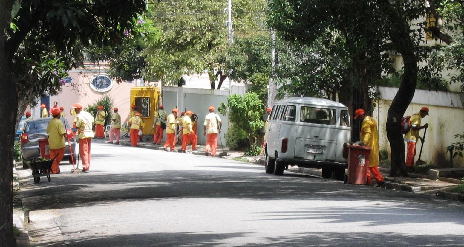 Garis executando a limpeza de uma rua da cidade de São Paulo, Brasil.